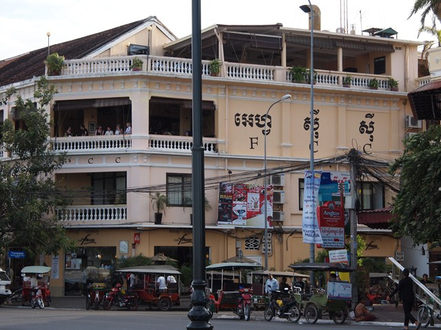 Flickr description Foreign Correspondents Club